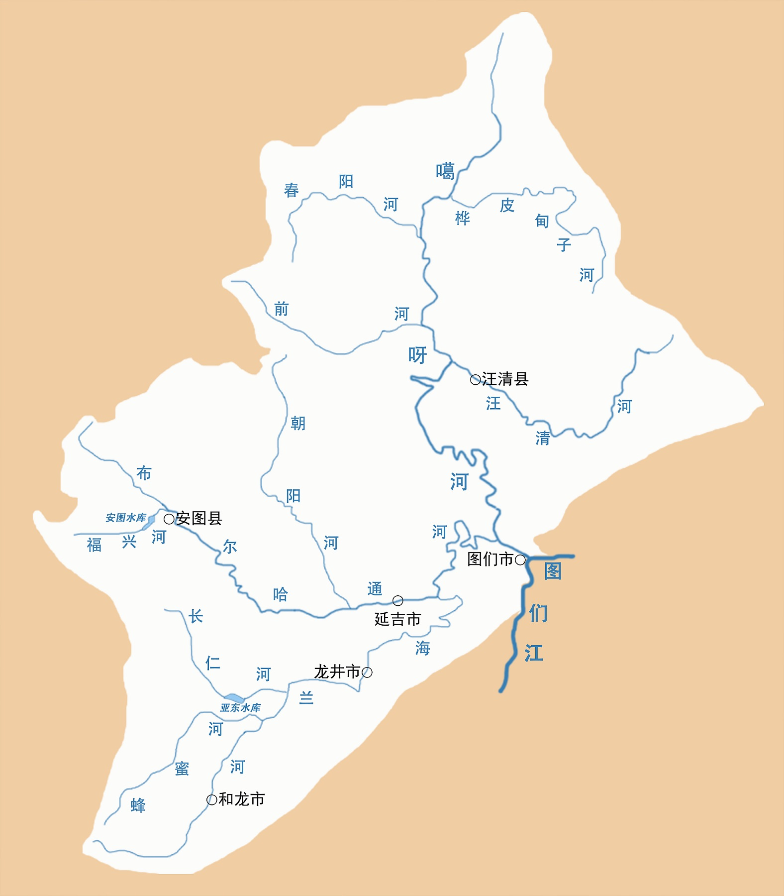 嘎呀河の流域周辺図